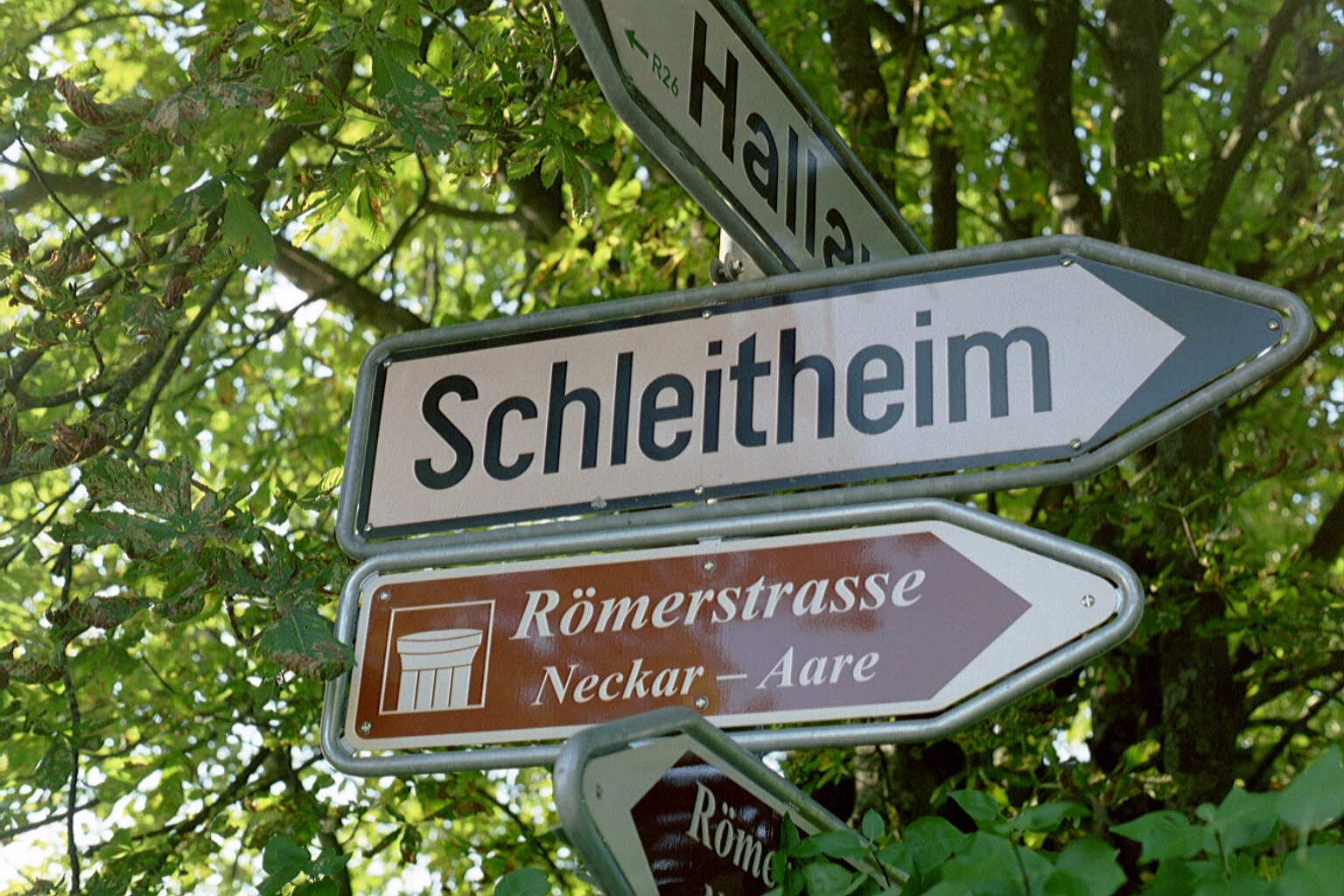 Station Schleitheim (Juliomagus) an der Römerstraße Neckar-Alb-Aare im Kanton Schaffhausen (CH)